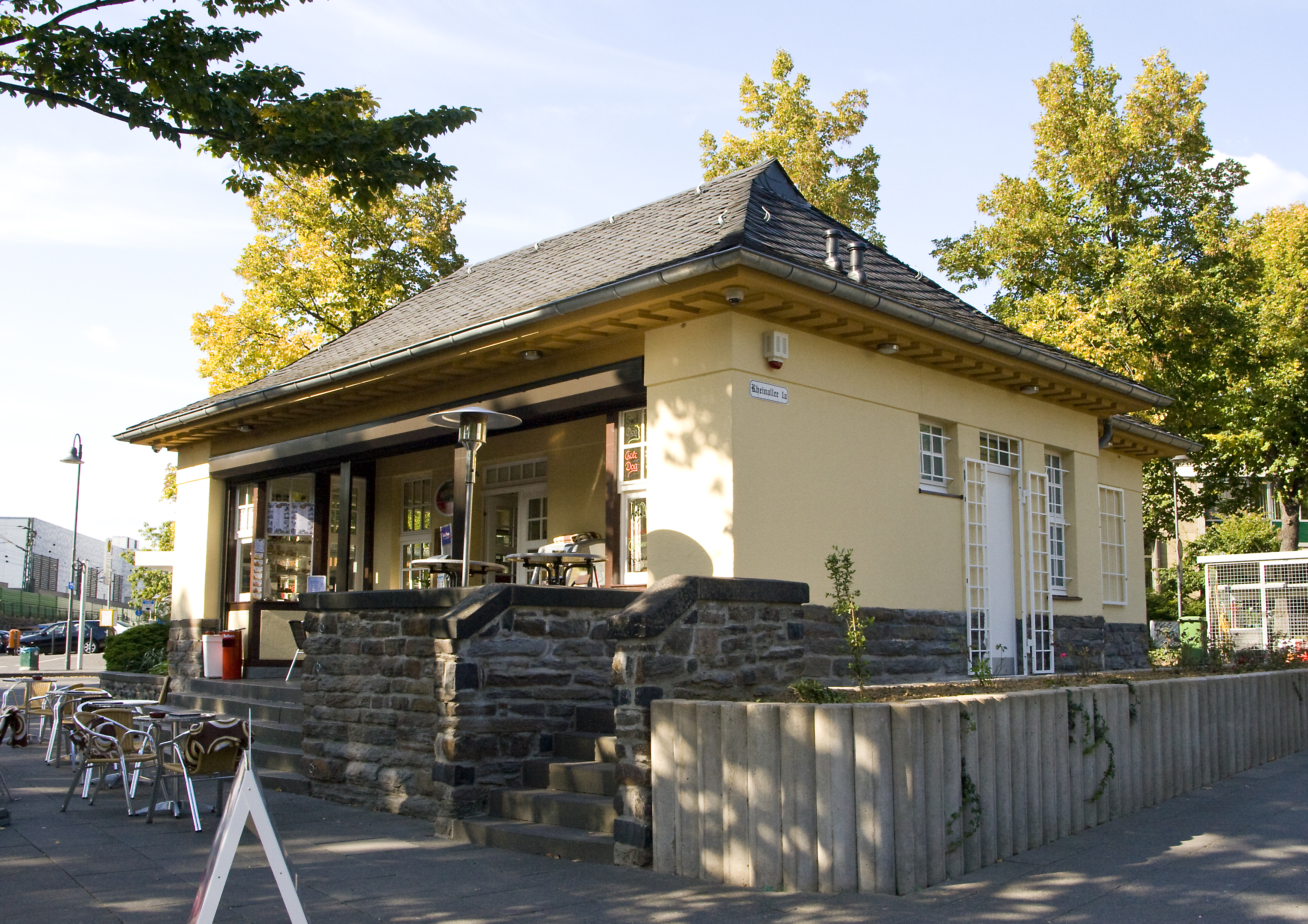 Ehemalige Straßenbahn-Wartehalle in Bonn-Bad Godesberg, Rheinallee / Rüngsdorfer Straße; erbaut 1911; unter Denkmalschutz